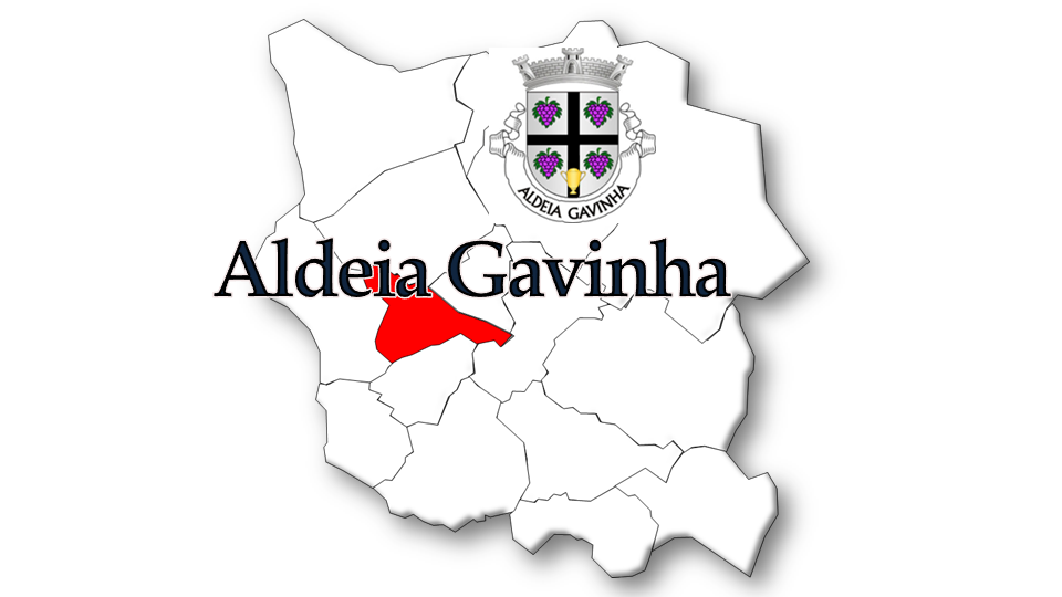 Evolução da População